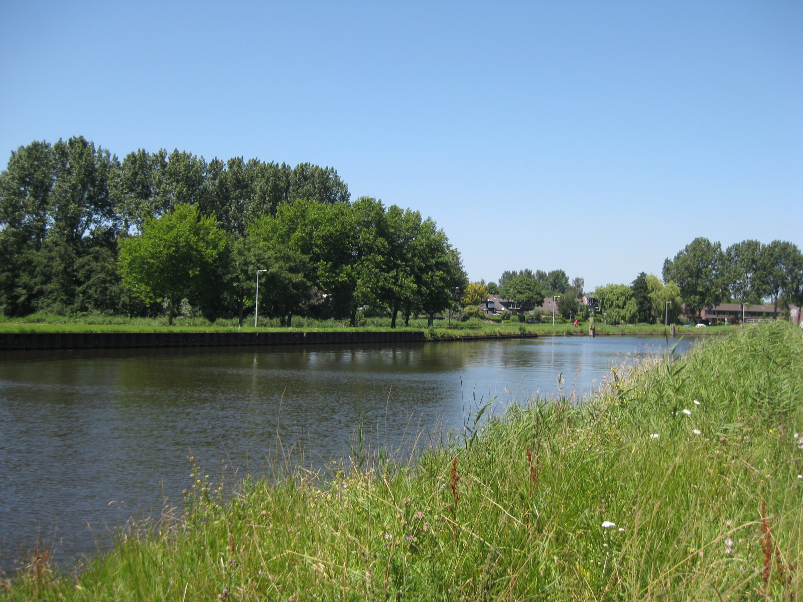 Het Noordhollandsch Kanaal bij Amsterdam Noord.